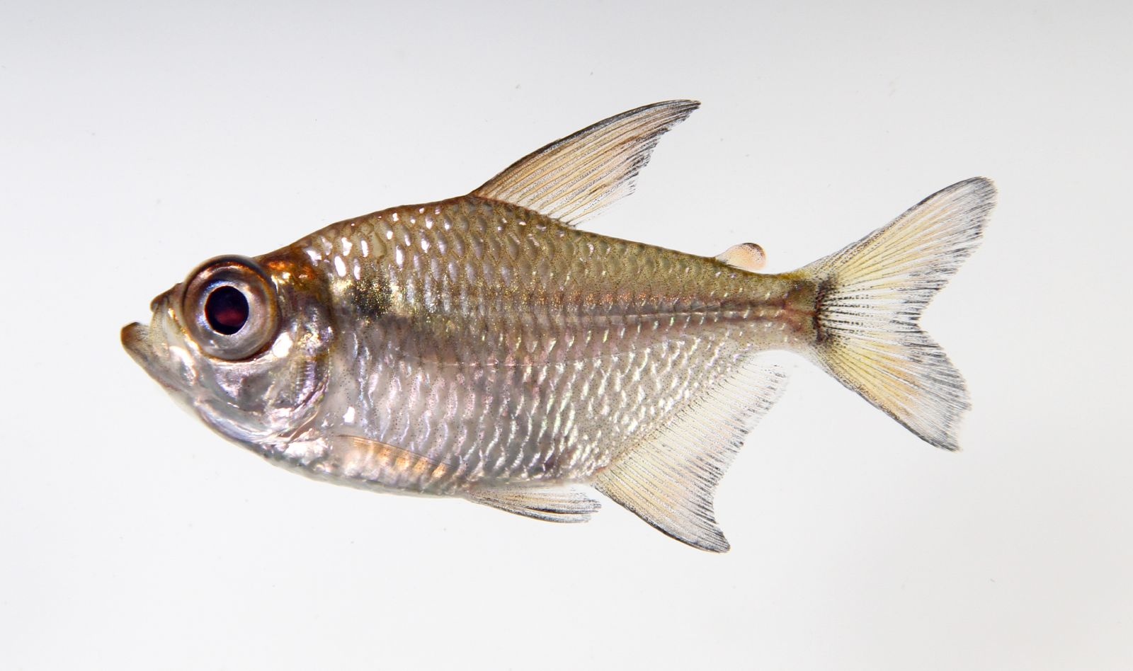 Characidae Moenkhausia sp